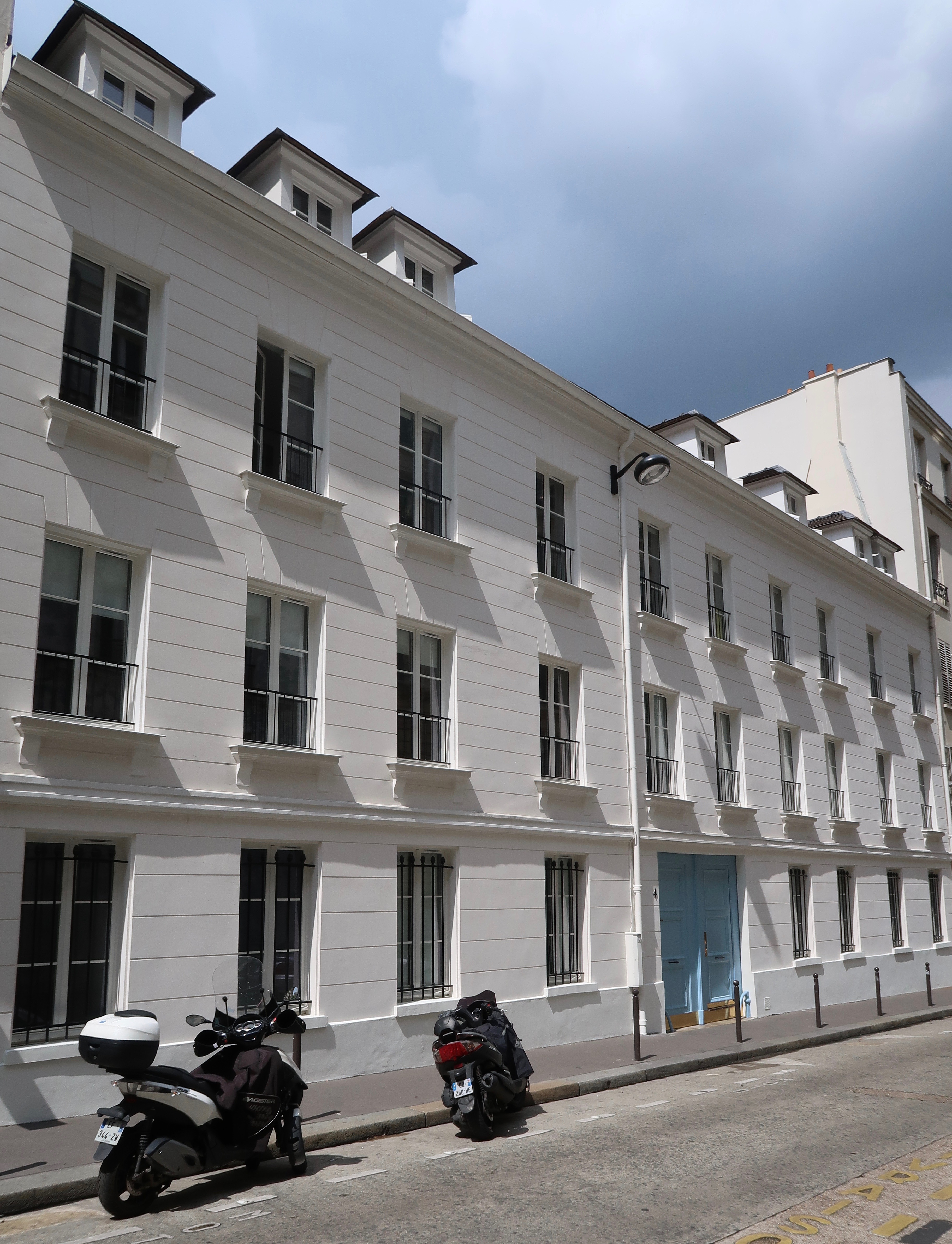 4 rue de Chevreuse (Paris, 6e).